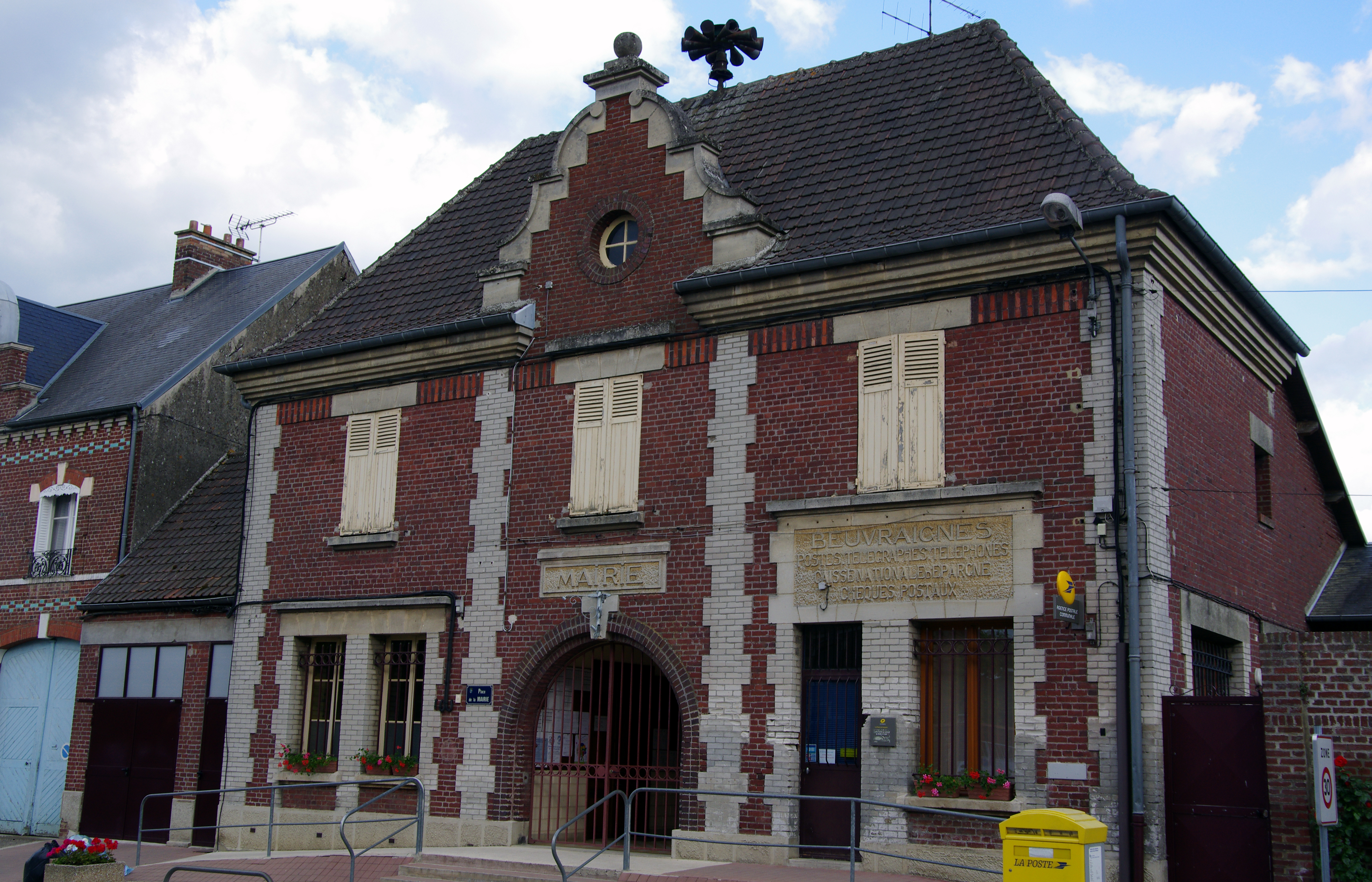 Beuvraignes (Somme, France) - La mairie. .